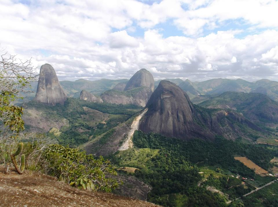 Monumento Nacional dos Pontões Capixabas - vista a partir da pedra do Camelo - 720m